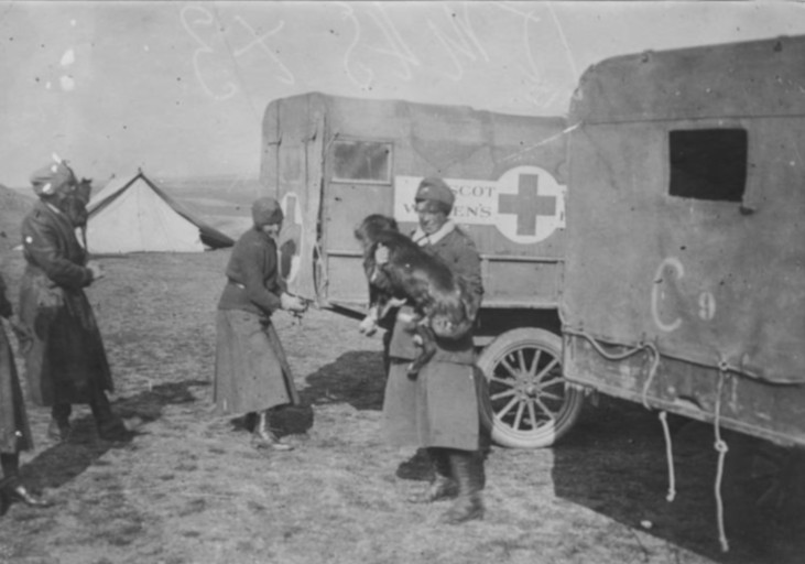 reportage photographique de l'armée française.